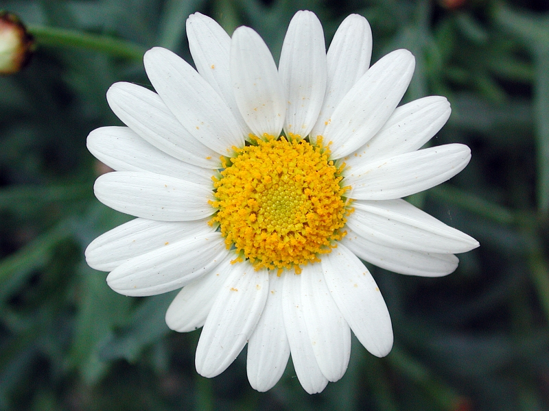 Magerite, Leucanthemum, Marburg, Neuer Botanischer Garten, Germany